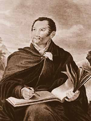 Свиньин, Павел Петрович